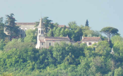 Eglise de Cuq